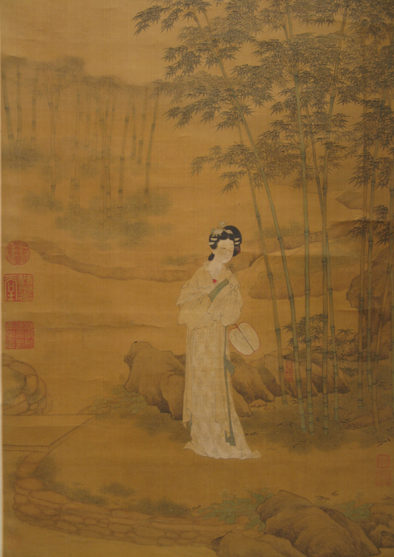 China; Hanging scroll; Paintings